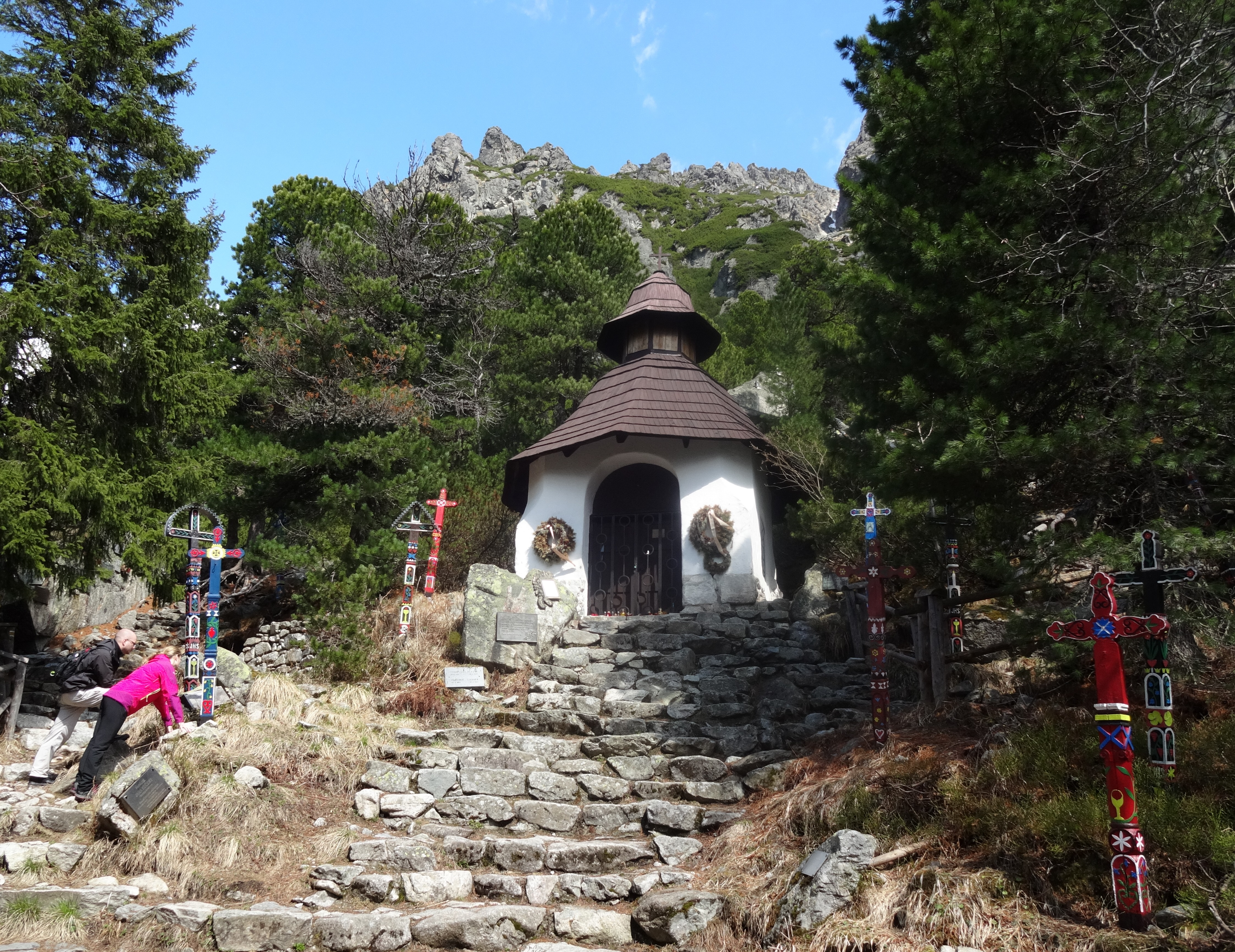 Tatrzański Cmentarz Symboliczny